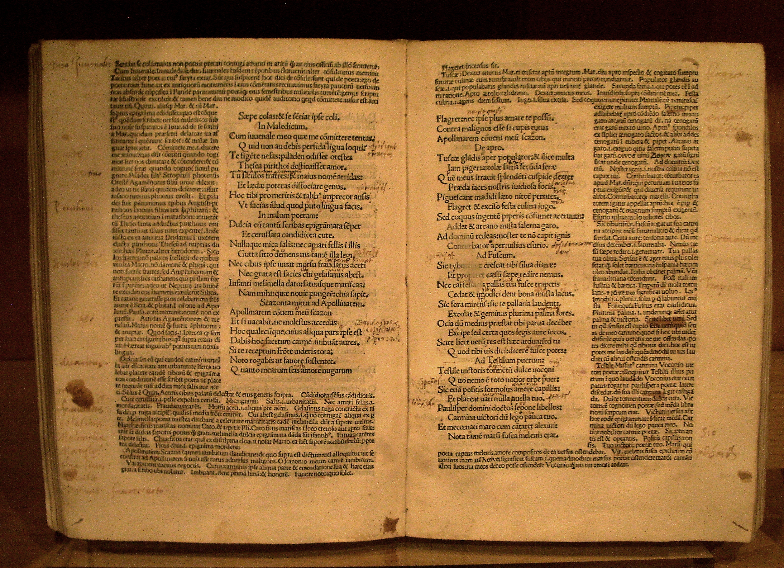 [Marco Valerio Marcial], [Epigrammata], Mediolani, Udalricus Scinzenzeler, 1490. Custodiado en el Archivo del Gobierno de Aragón.